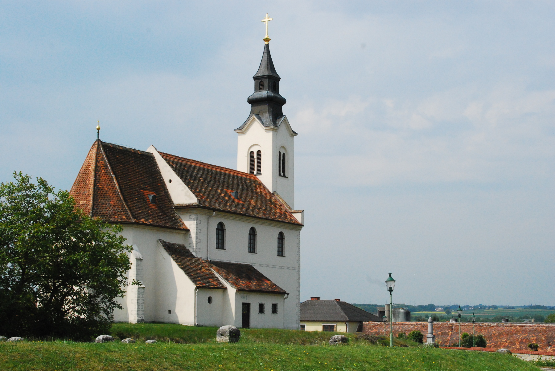 Die Kirche von Frauenhofen bei Horn in Niederösterreich